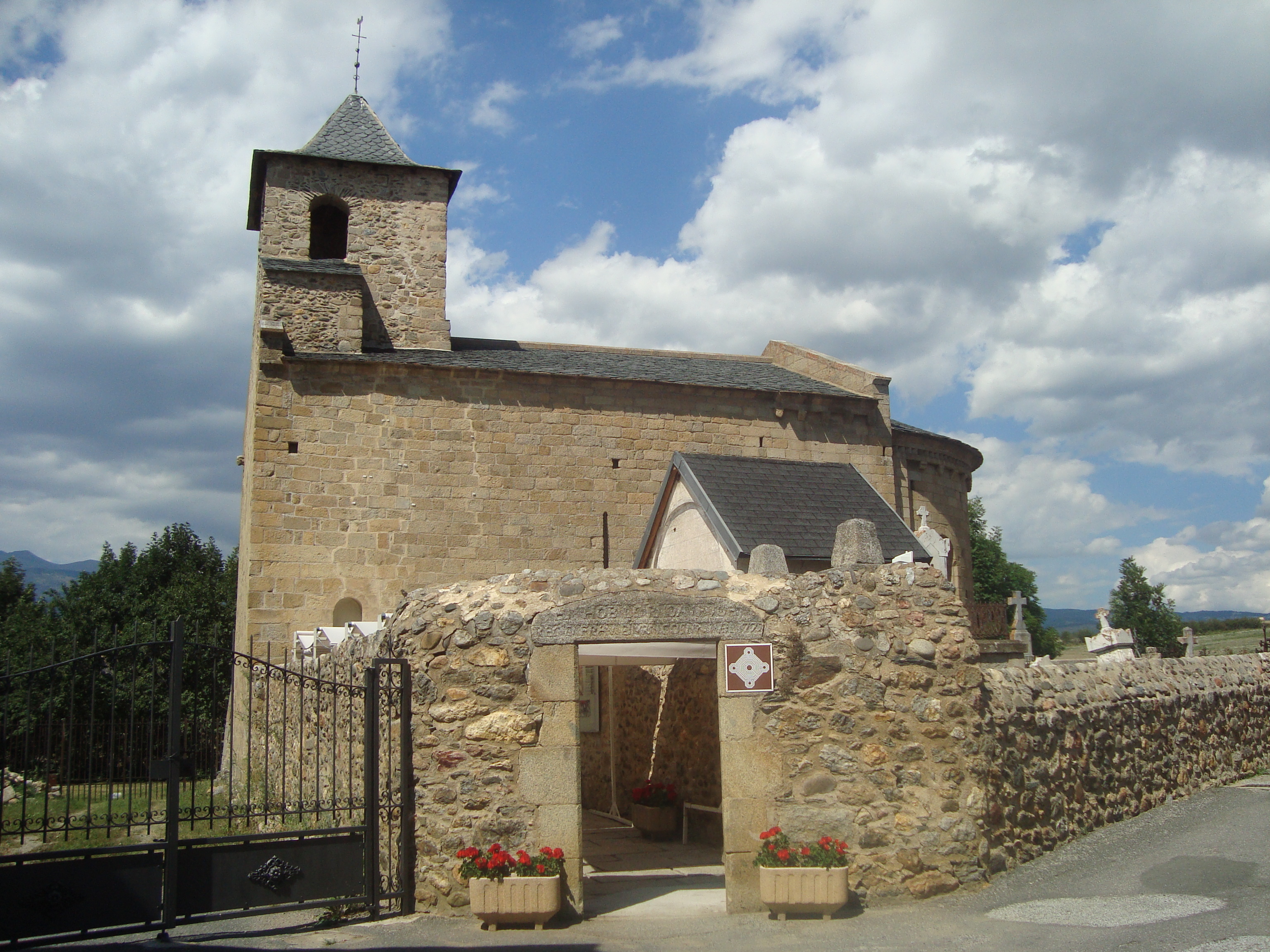 Iglesia románica de Sant Martí d'Hix, Bourg-Madame (Languedoc-Rosellón, Francia)